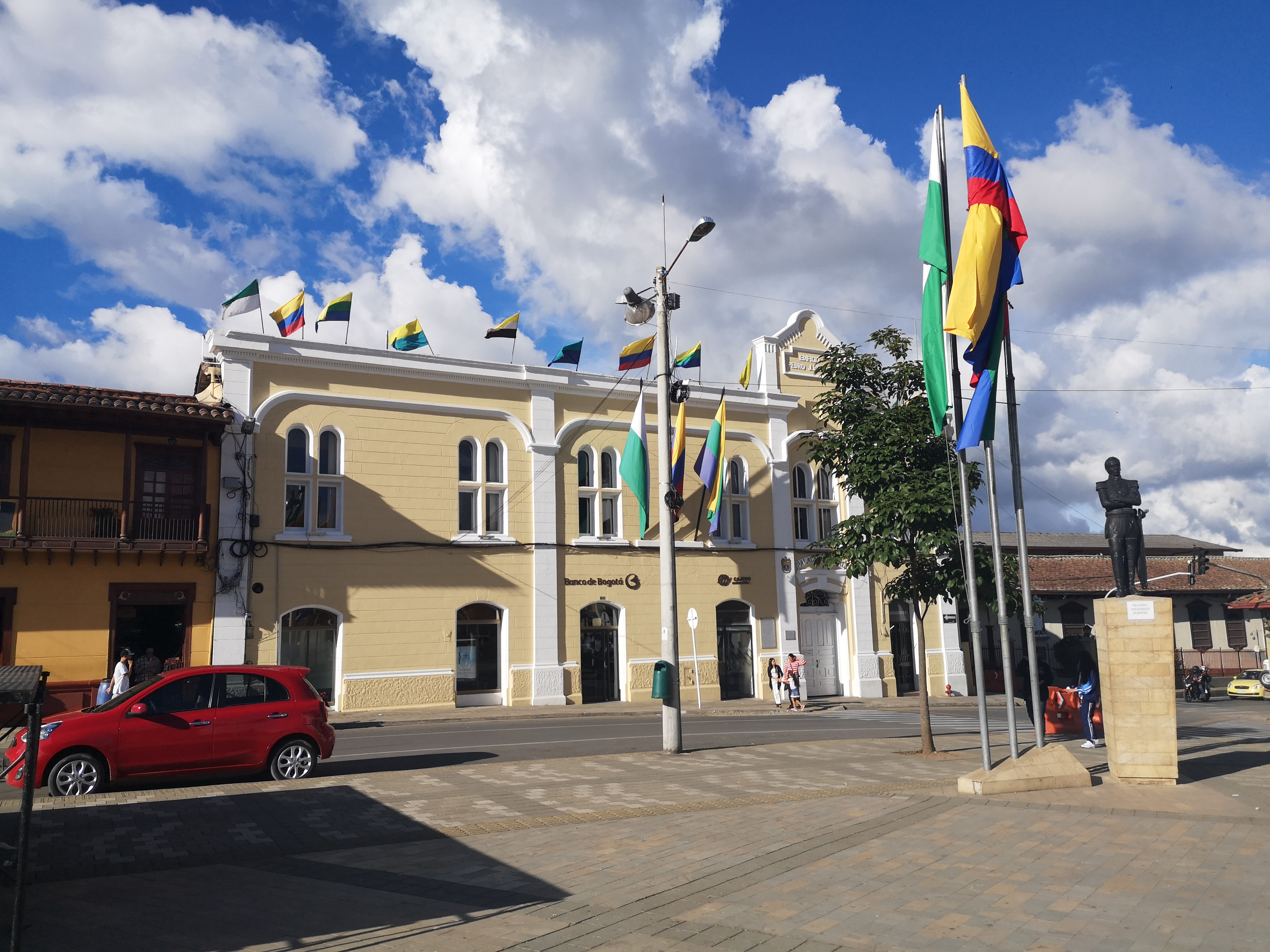 Palacio Municipal de Santa Rosa de Osos, 2019